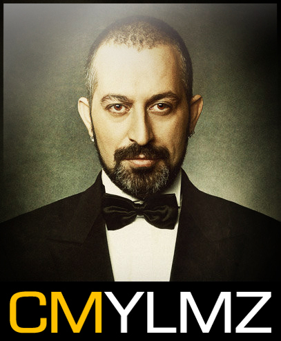 Cem Yılmaz'ın Wikipedia maddesinde kullanılmak üzere tasarlanmış profil fotoğrafıdır. Tasarım: Mehmet Turgut